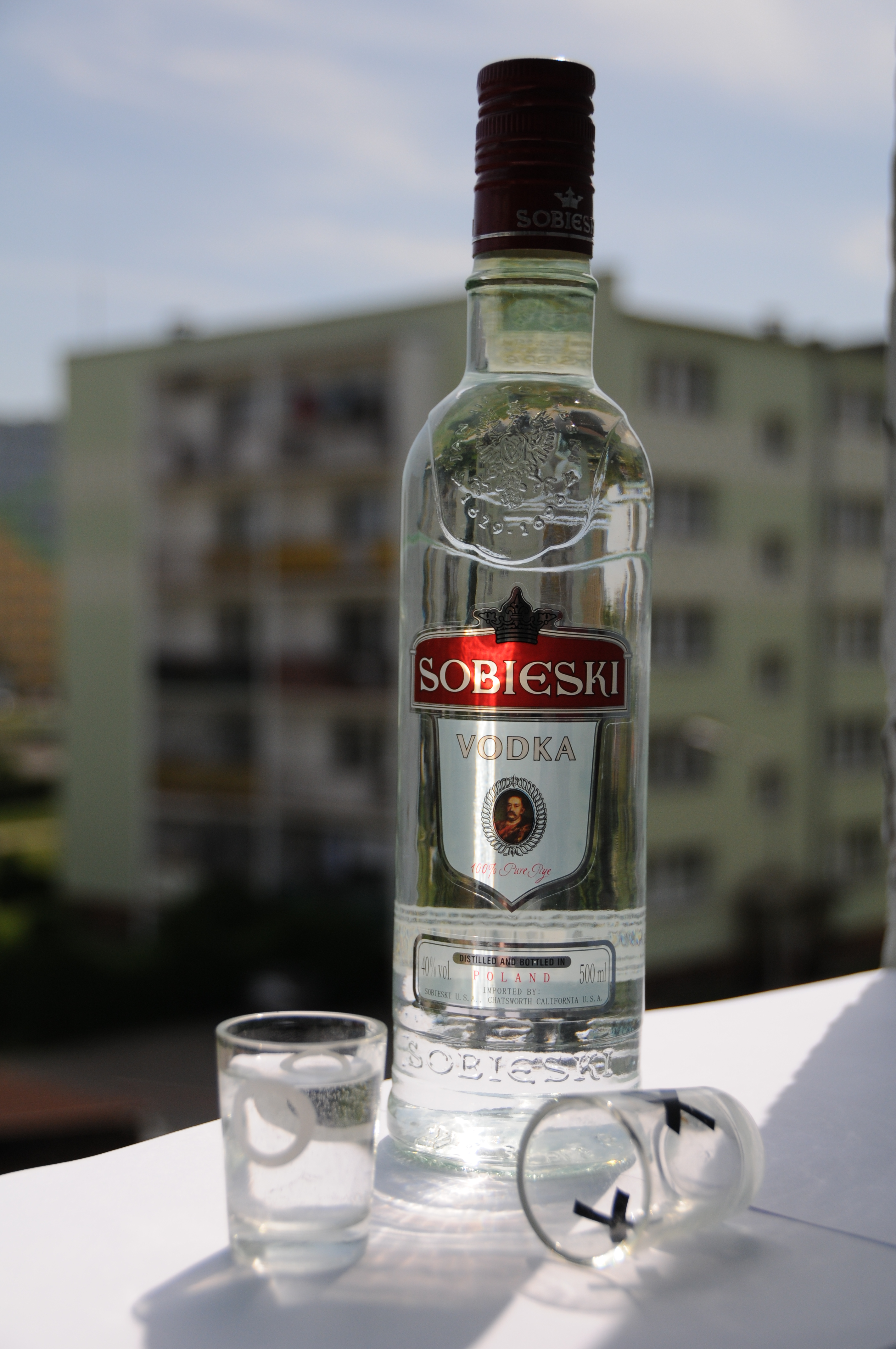 Une bouteille de vodka Sobieski